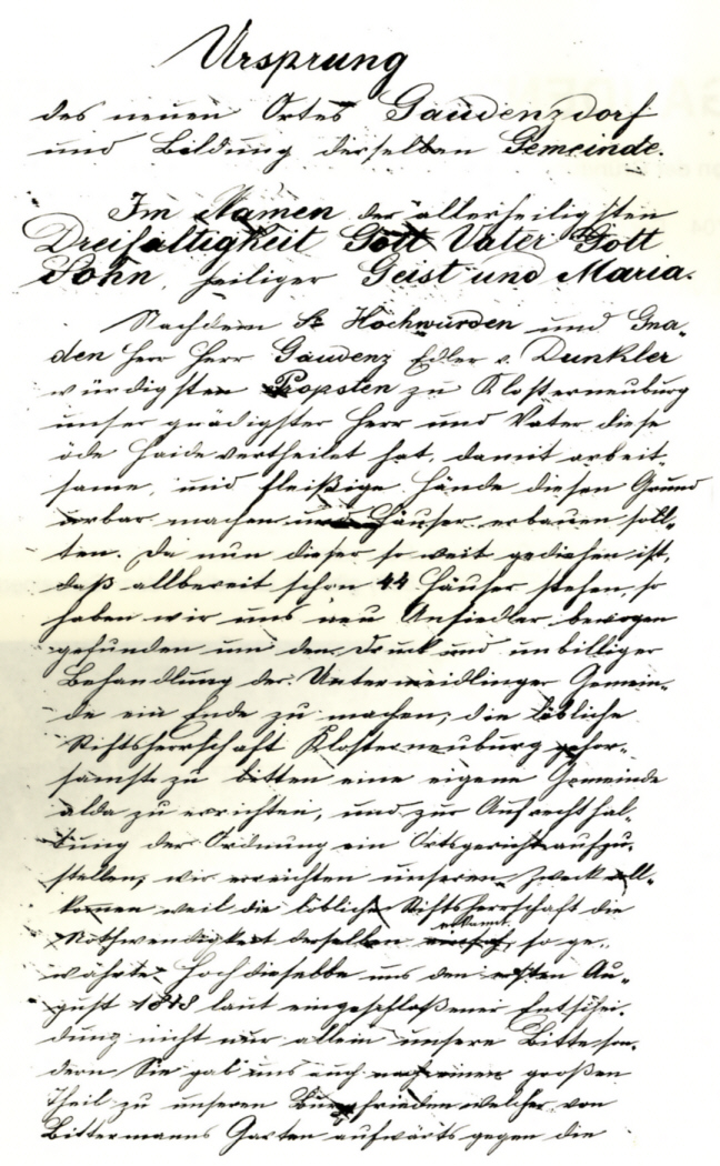 Ursprung der Gemeinde Gaudenzdorf durch das Stift Klosterneuburg, 1819